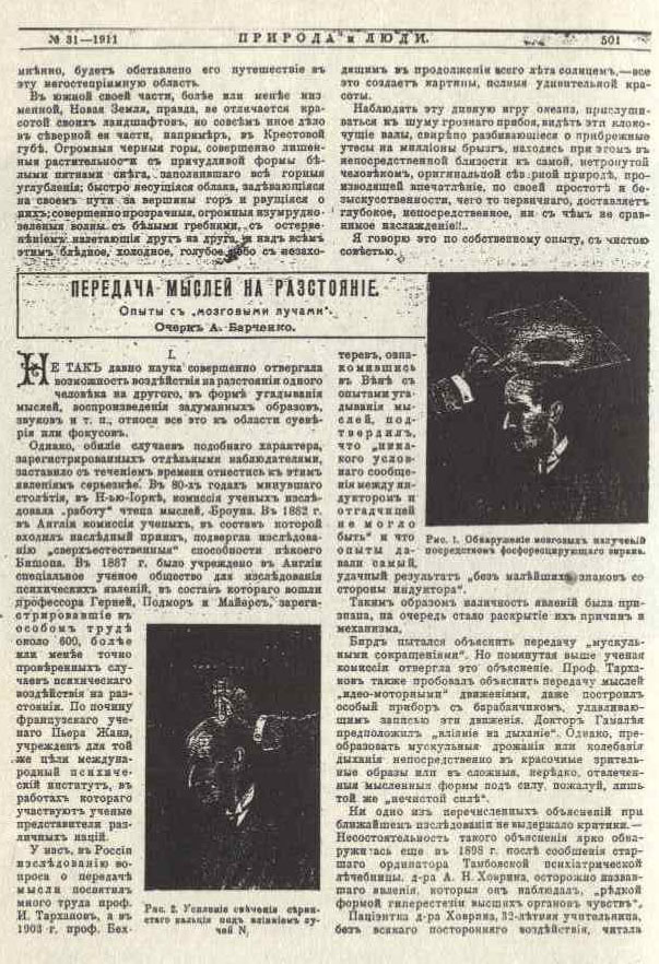 Скан публикации Барченко, Александр Васильевич "Передача мыслей на разстоянiе" в журнале "Природа и люди", 1911 год